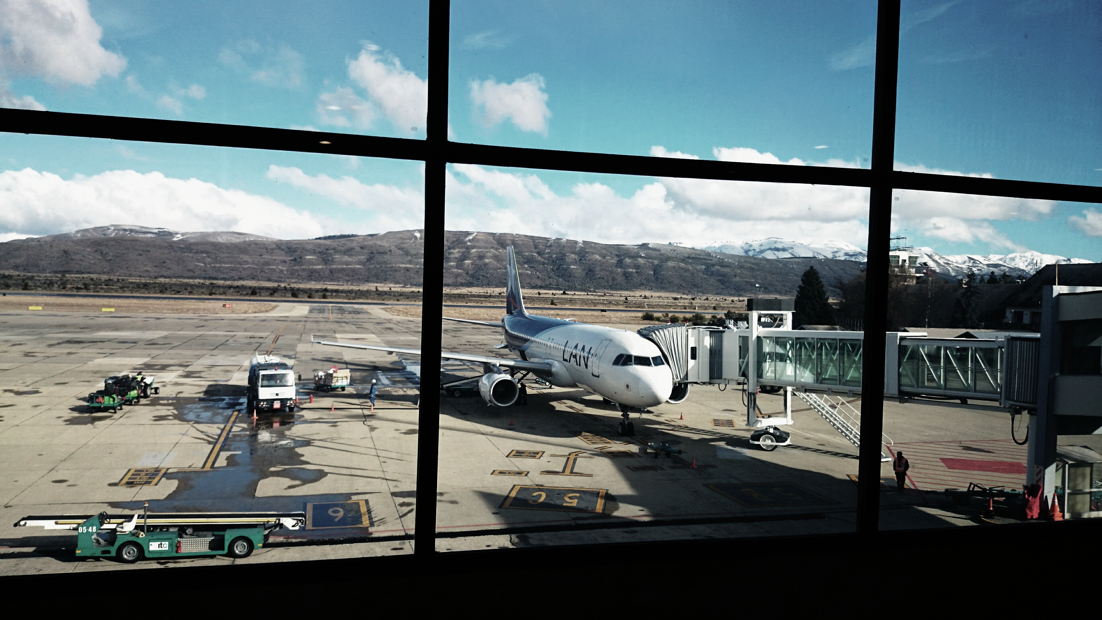 No te quedes con la ñata contra el vidrio! Vola con LAN